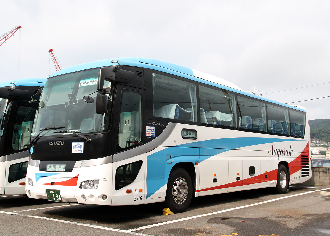 ・登録番号 長崎200か・496 ・長崎自動車㈱松が枝営業所所属 ・夜行高速用車両 ・2014年9月 長崎市内にて撮影 ・撮影者 Zondag2000